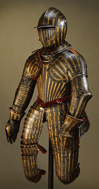 höger rustningshandske barnrustning. Höger handske till Vladislav IV:s barnrustning